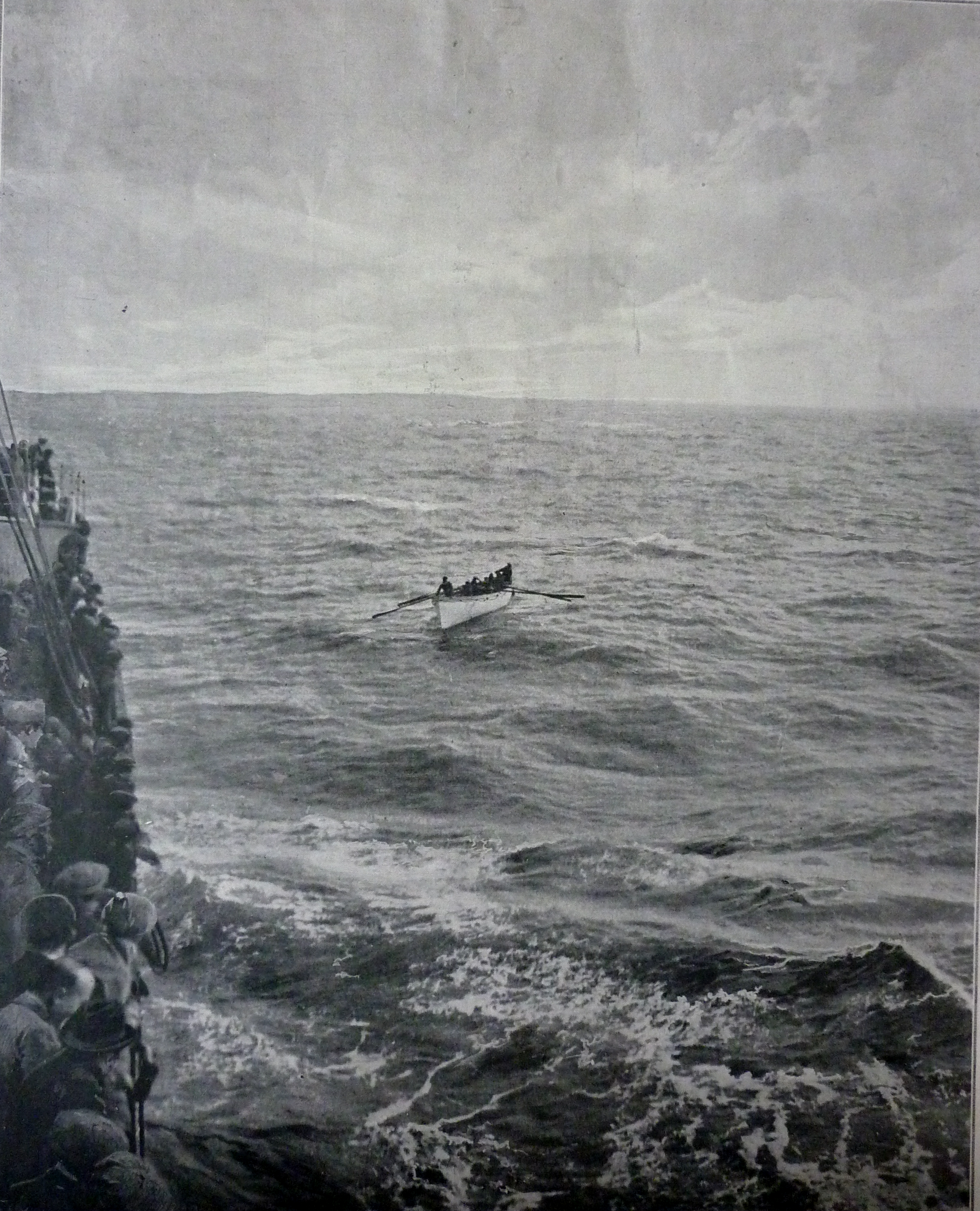 Canot de rescapés du paquebot Afrique avec 9 survivants recueillis par le paquebot Ceylan, photographie originale Jean Nugue, passager du Ceylan